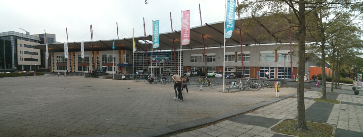 Sport- en Evenementencomplex Merwestein is een veelzijdig complex, gelegen in de wijk Merwestein in de Nederlandse gemeente Nieuwegein.